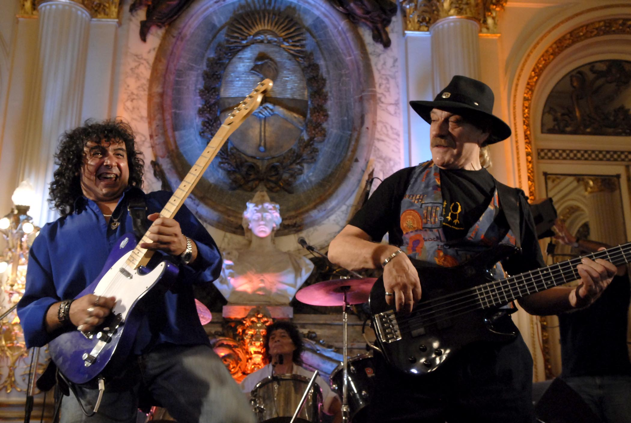 Recital de Vox Dei en Casa Rosada.